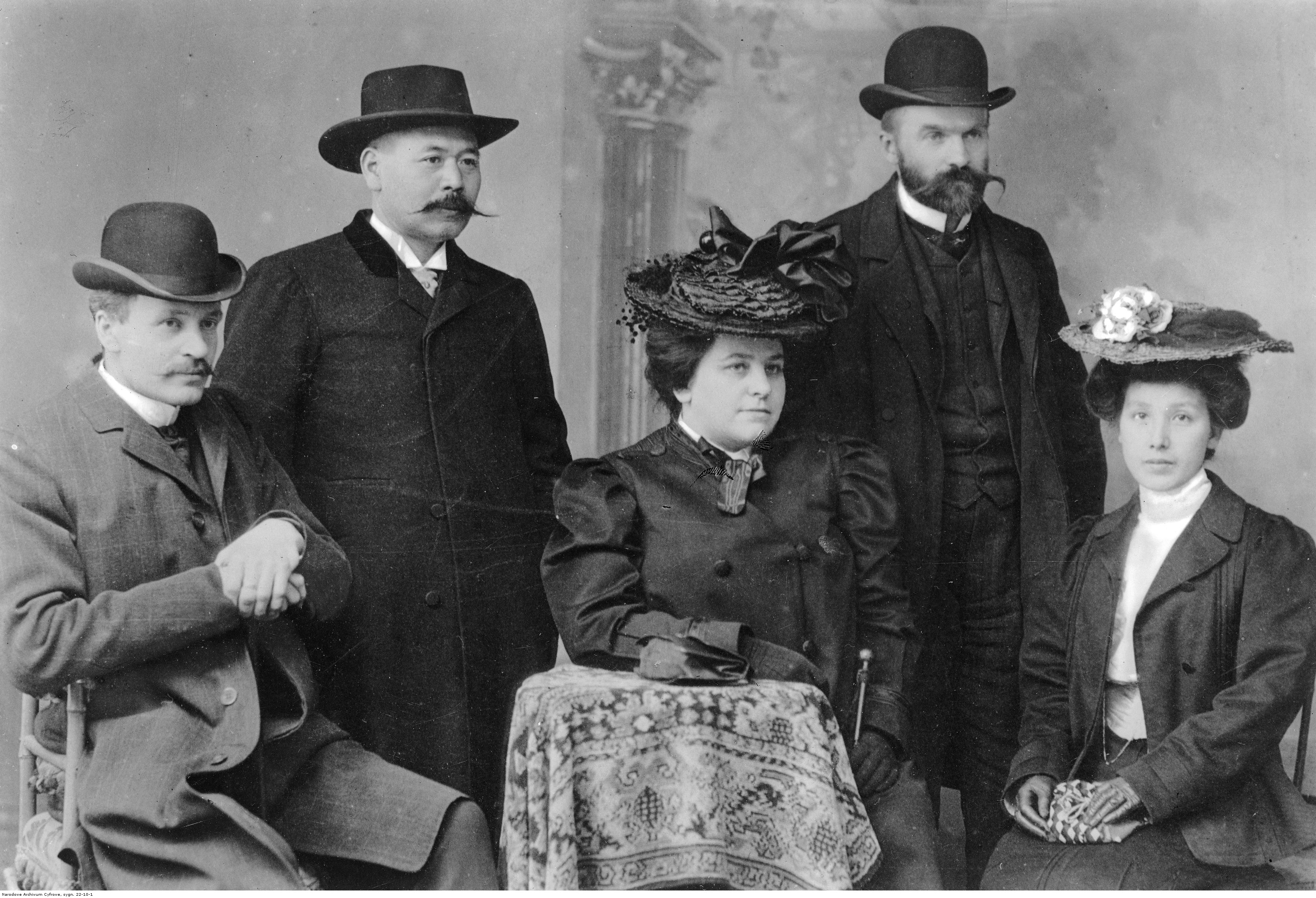 Fotografia grupowa. Widoczni od prawej: Jadwiga z Eysmonttów Kunicka "Chimera", Józef Piłsudski, Maria z Koplewskich Piłsudska, NN, Ignacy Mościcki (siedzi).